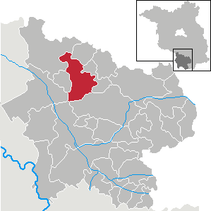 Schlieben in Brandenburg (Country) - District Elbe-Elster